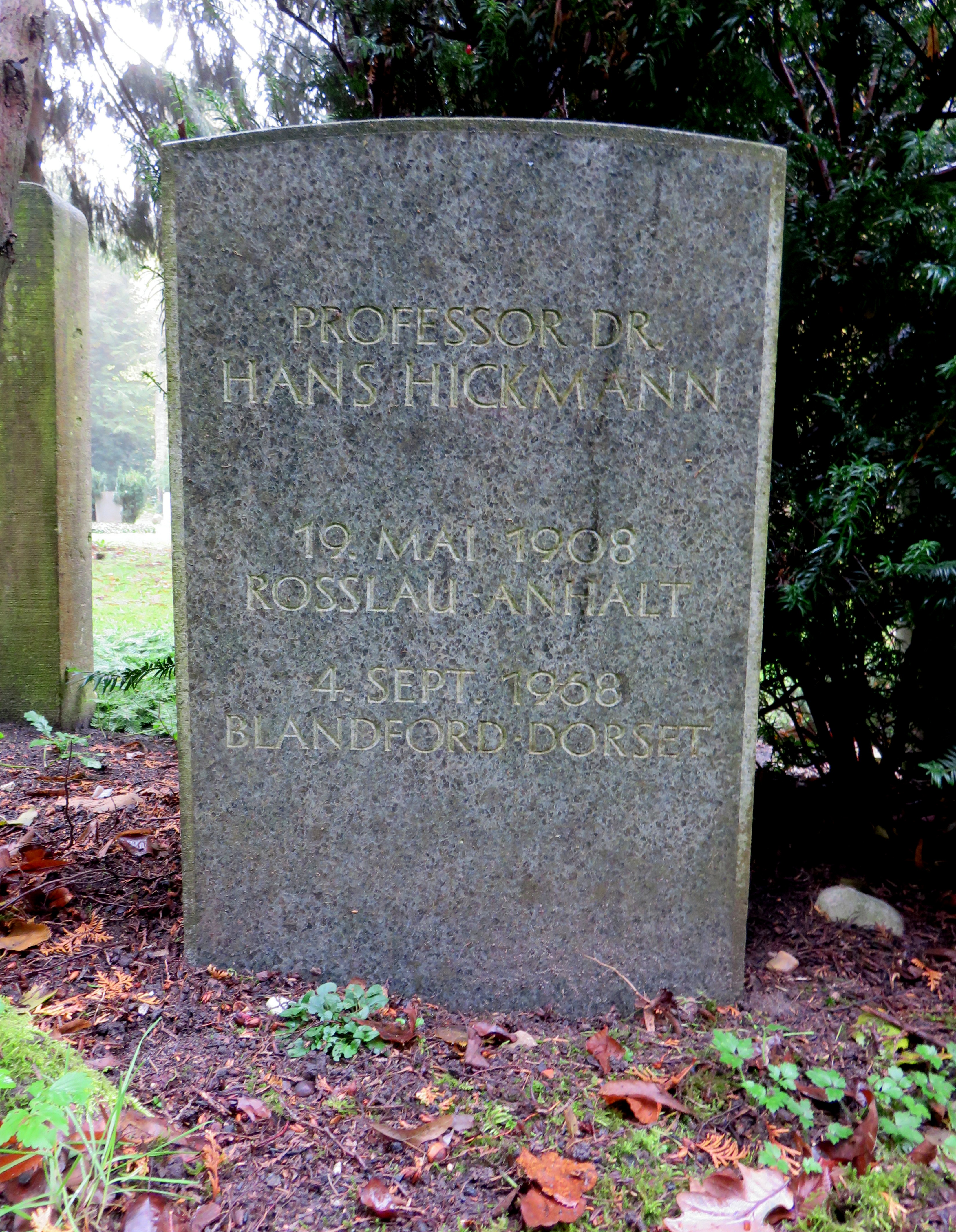 Grab des deutschen Musikwissenschaftlers Hans Hickmann, Friedhof Ohlsdorf, Planquadrat Q 18 (südlich Kapelle 2).